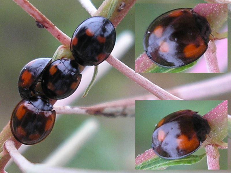 Pine Ladybugs (Exochomus quadripustulatus). These (youngsters?) were sitting on some flowery plant rather than on a pine tree (abundant in the area however). Location: Motorway rest area Lucasgat near Apeldoorn, Netherlands. Keywords: black, red, rimmed shield --- nl: Viervleklieveheersbeestje (Exochomus quadripustulatus). Deze (jonkies?) zaten op wat onkruid in plaats van op de gebruikelijke naaldbomen (wel veel aanwezig vlak in de buurt) Locatie: Parkeerplaats "Lucasgat" aan de A1 bij Apeldoorn Trefwoorden: zwart, rood, rand aan schild --- de: Vierfleckiger_Kugelmarienkäfer (Exochomus quadripustulatus). Dies (junge?) Tiere liefen auf einer Pflanze herum - nicht auf die viele Nadelbaume in der nähe.